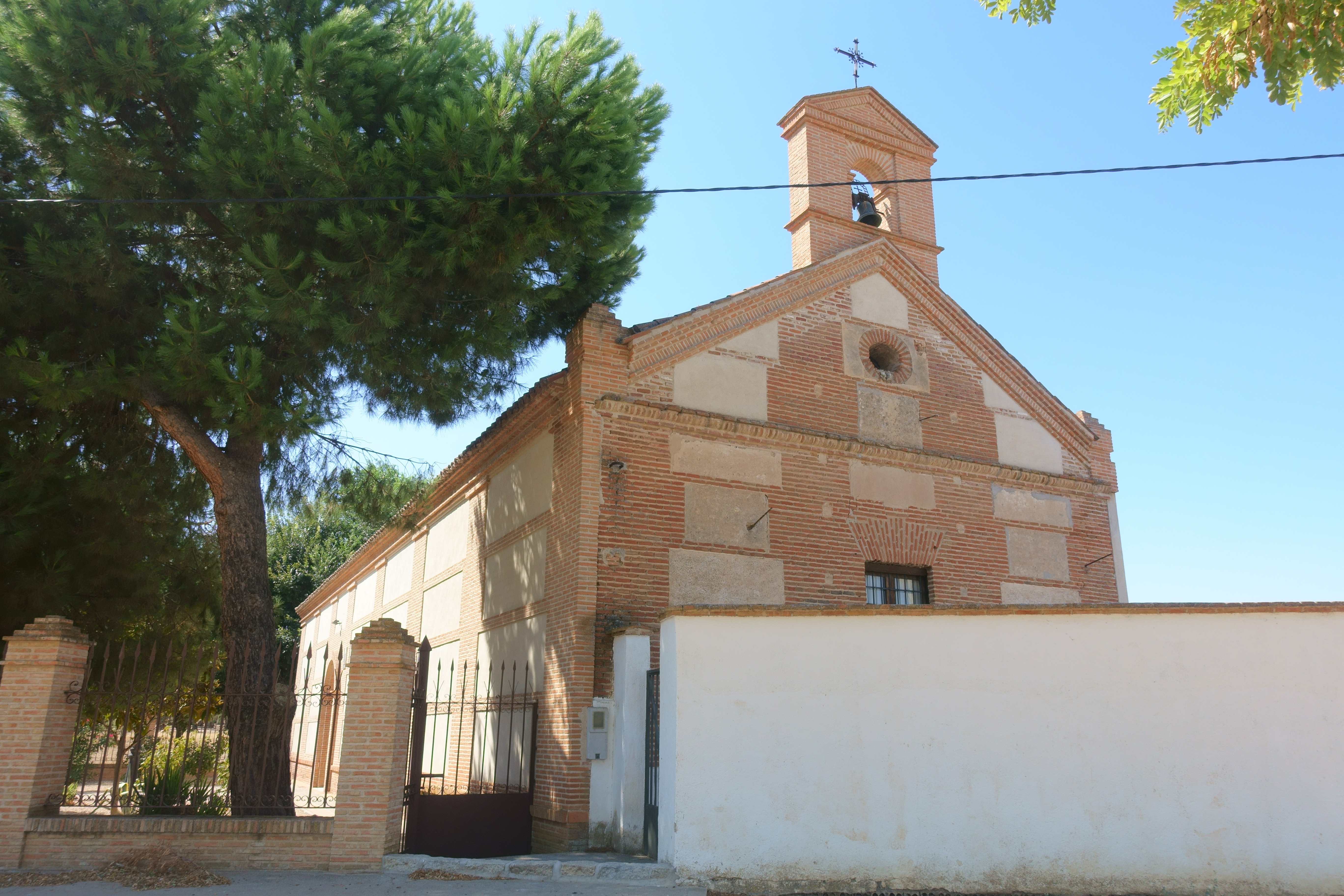 Ermita de Nuestra Señora del Prado, Domingo Pérez (Toledo, España).